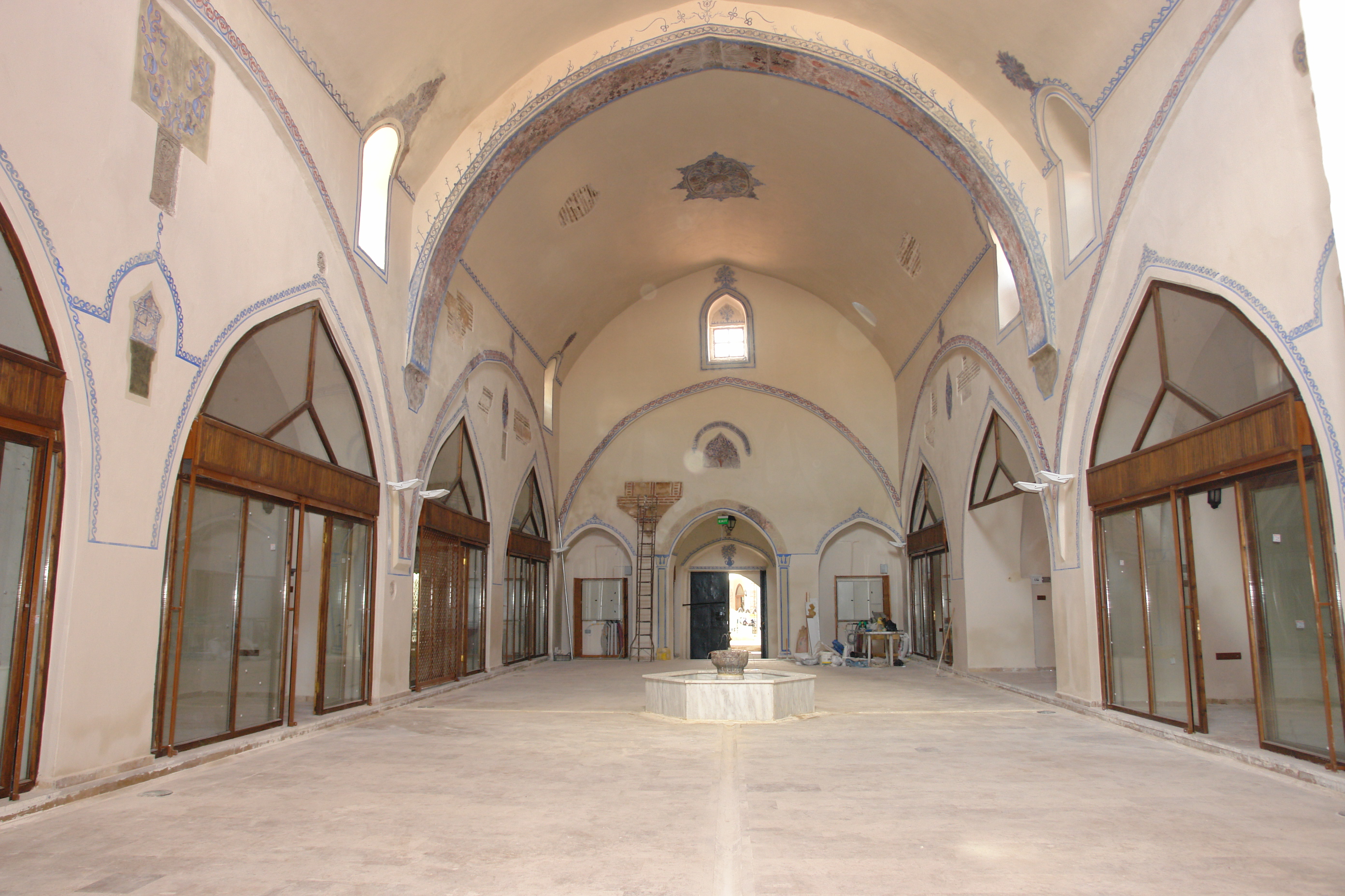 Küçük Bedesten